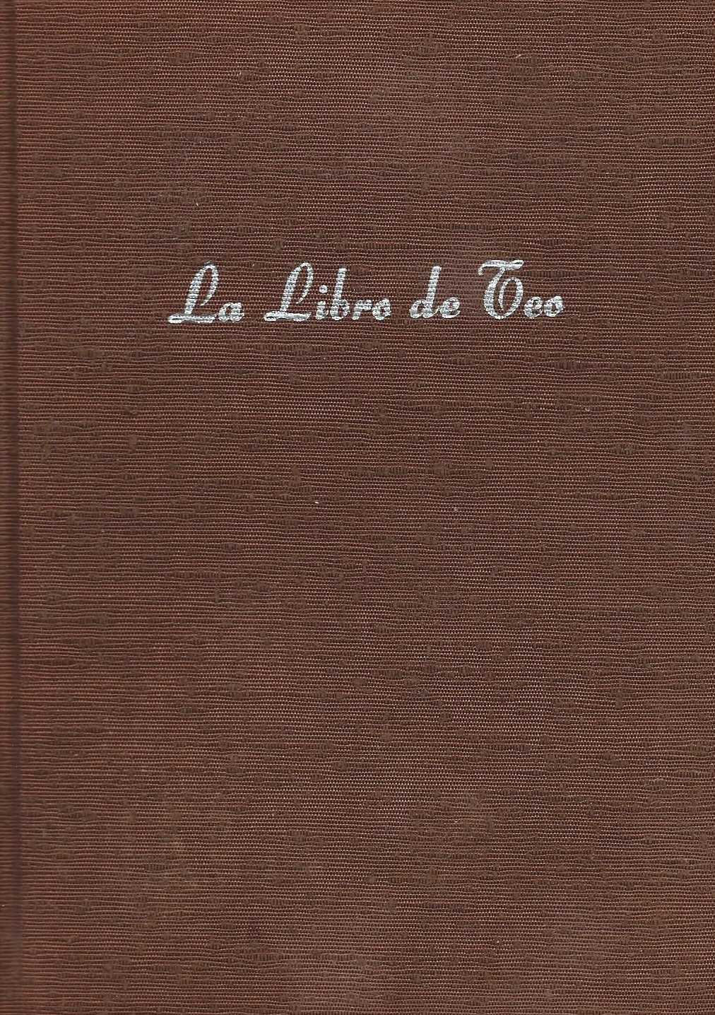 librokovrilo de libro "La Libro de Teo", 1965